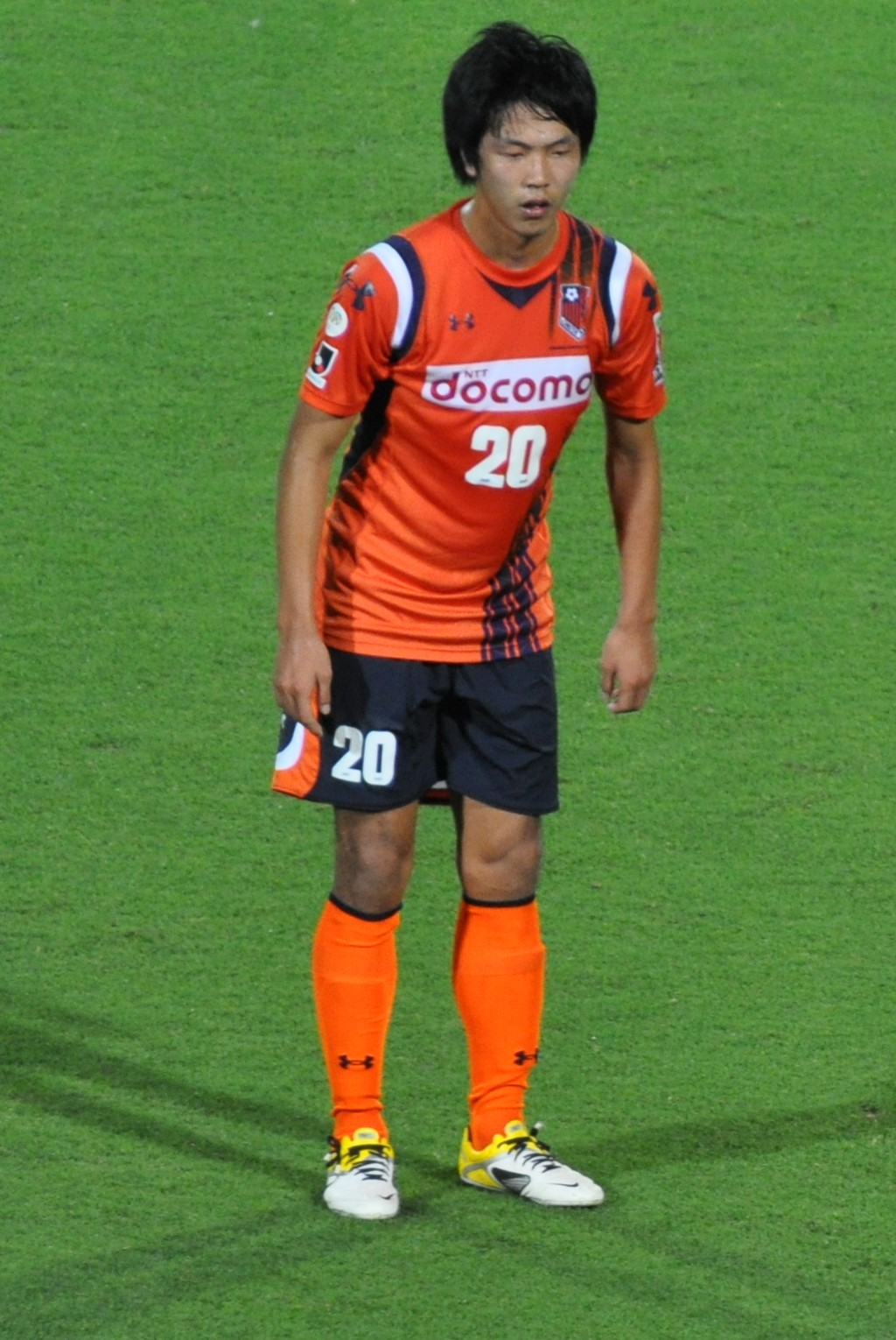 Kim Young-Gwon, cropped from 2011.07.10 Omiya Ardija 2-3 Gamba Osaka_152